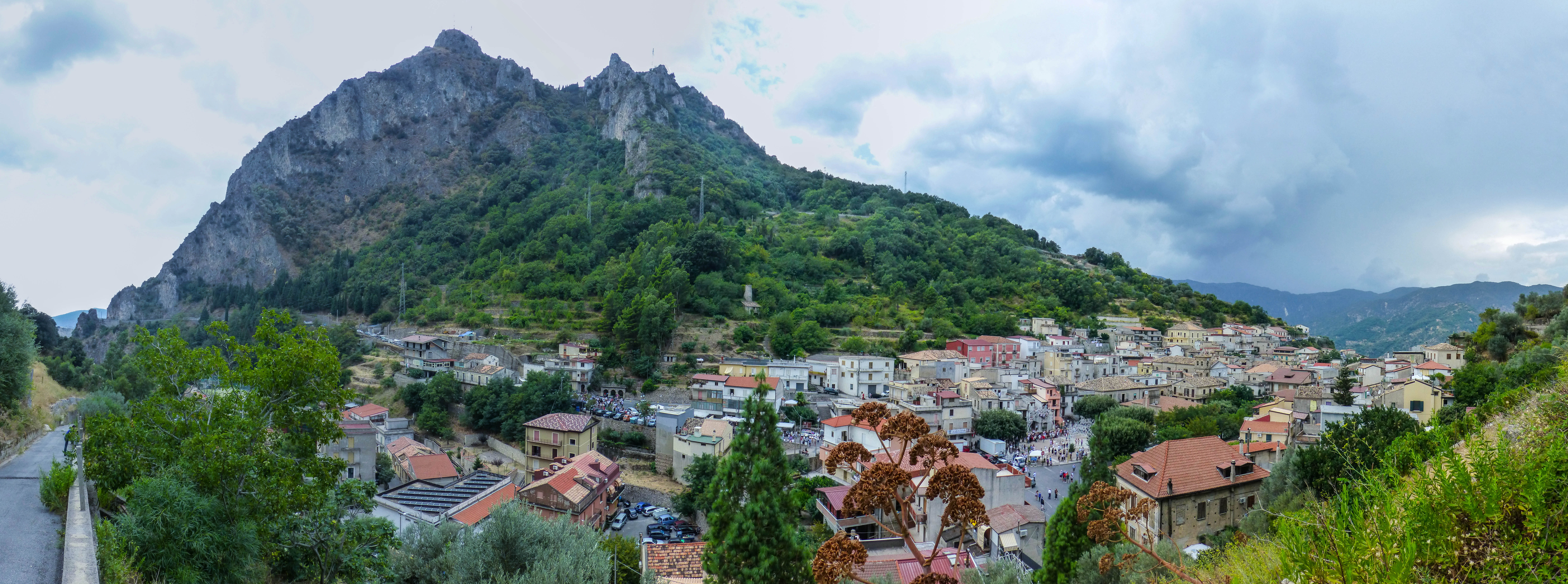 Panorama pazzano 12 agosto 2012, Con Monte Stella, Fontana Vecchia, Mulino Vrisi, Piazza IV Novembre e Chiesa di Santa Maria Assunta